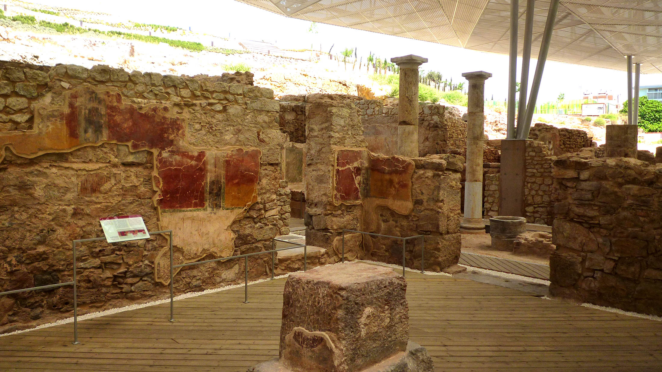 Edificio del atrio toscano en el barrio del foro romano de Cartagena (España).